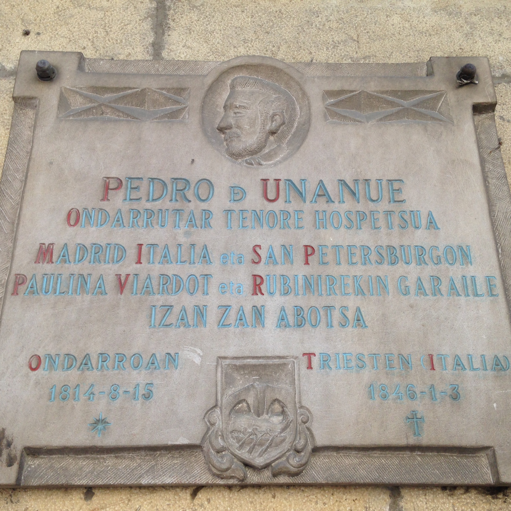 Placa homenaje al tenor ondarrés Pedro Unanue en la fachada de su casa natal.